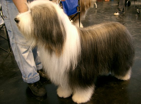 Bearded Collie auf der CACIB in Rostock 2004 Ort: CACIB in Rostock am 09.10.2004 Andere Bilder: Bearded collie.jpg; Bearded Collie3.jpg